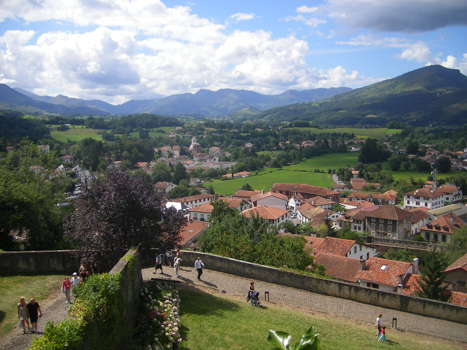 Saint-Jean-Pied-de-Port